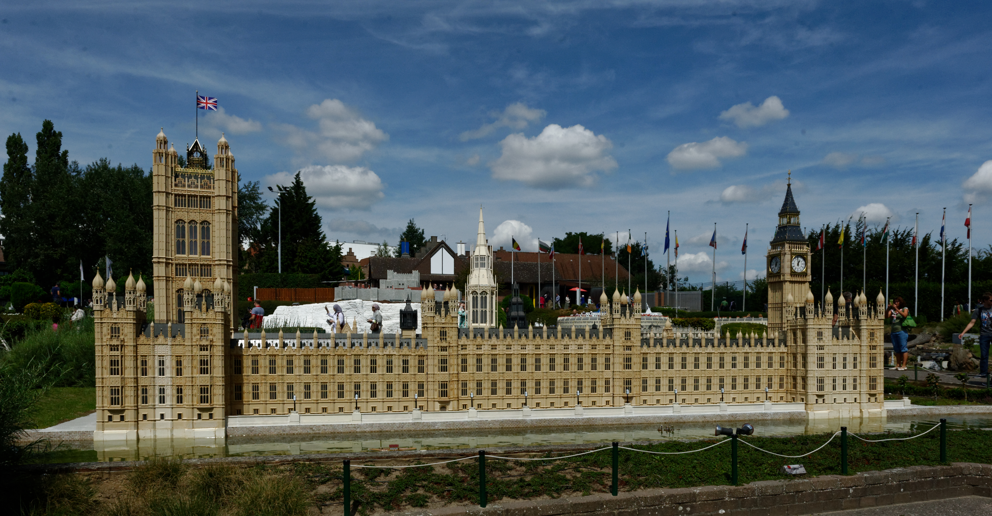 Modell im Mini Europa Brüssel